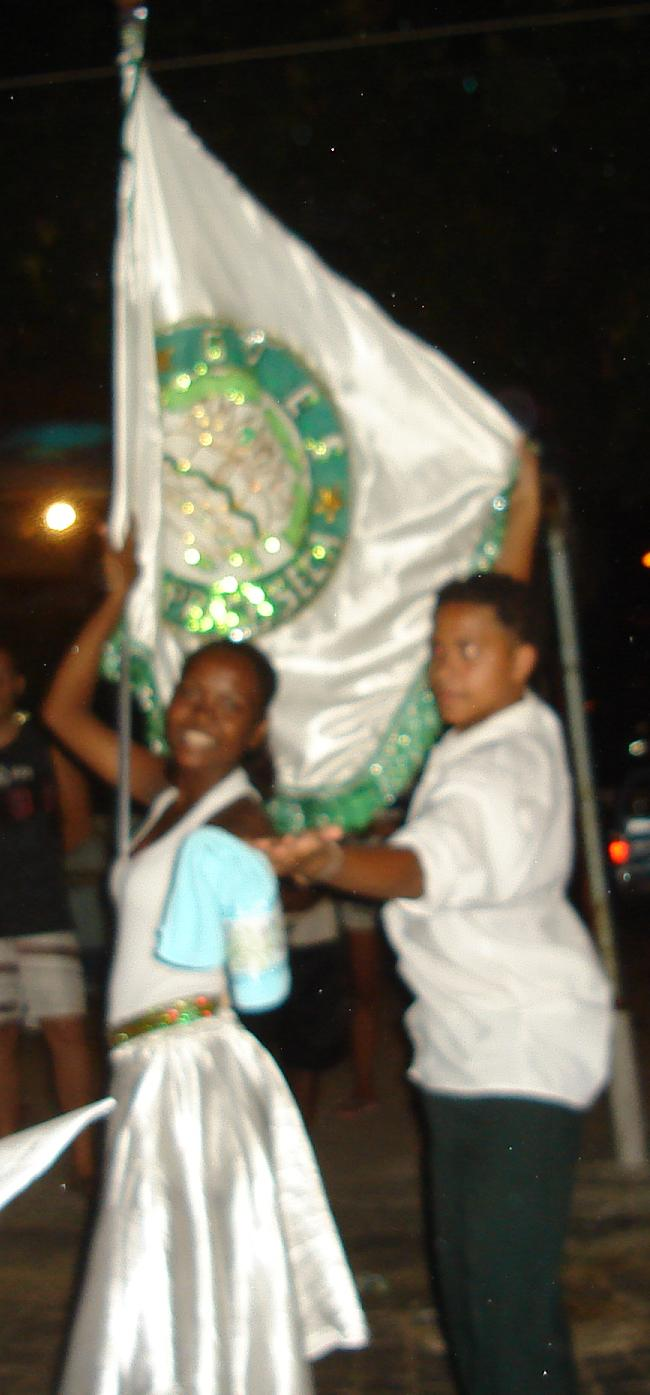 Segundo casal de mestre-sala e porta-bandeira do GRES Império da Praça Seca, no ensaio técnico de rua, em 27/01/2010.